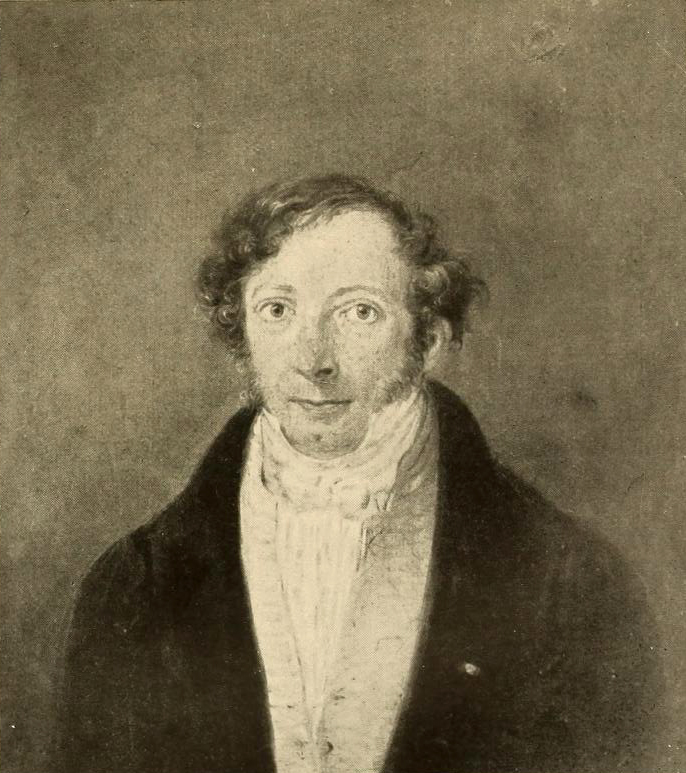 Giovanni Migliara (1785-1837) Ritratto del cavaliere Carlo Londonio, riproduzione monocromatica su carta dell'originale olio su tela